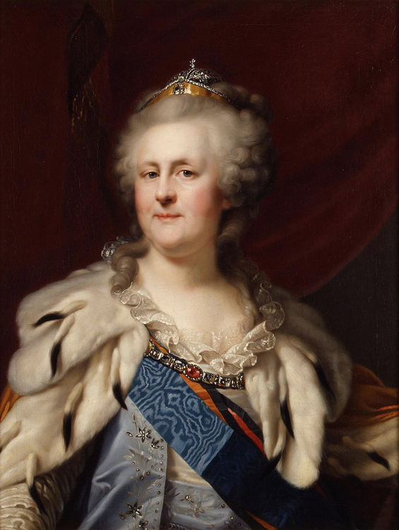 Zarin Katharina II. von Russland (1729-1796) mit Diadem und Krönungsmantel, um 1794. Sophie Friederike Auguste von Anhalt-Zerbst heiratete 1745 den russischen Thronfolger Peter III. und trug seitdem den Namen Katharina. Nachdem sie Peter 1762 entmachtet hatte, regierte sie allein das Zarenreich.